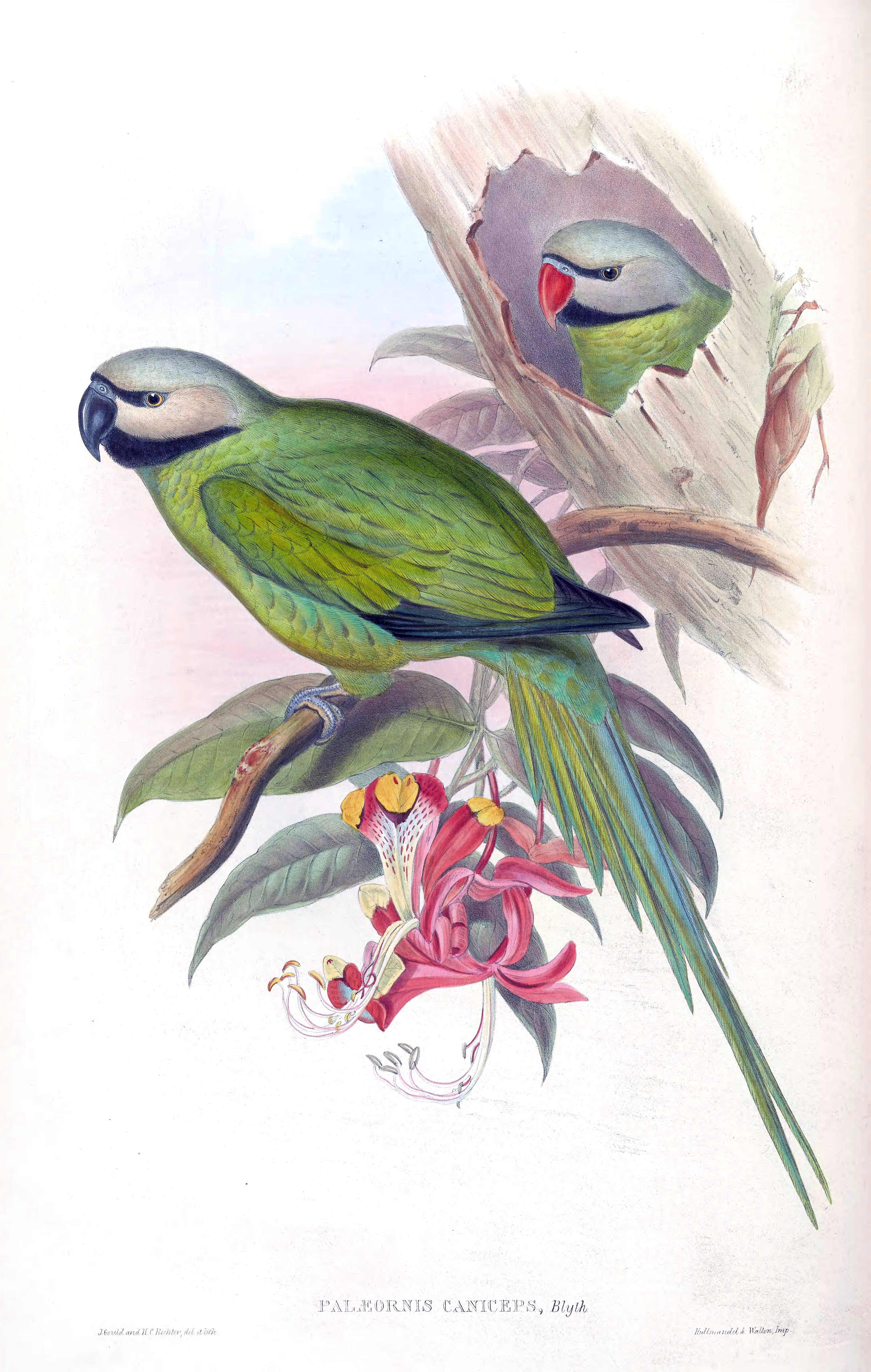 Psittacula caniceps